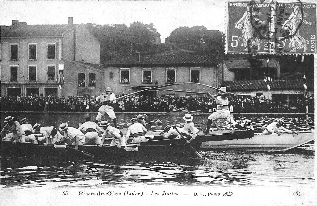 Rive de Gier (Loire) - Les Joutes. carte postale B.F., Paris, ayant circulé en 1911